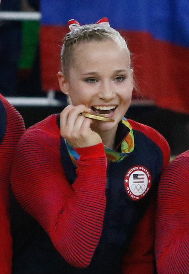 Rio de Janeiro - Ginastas dos Estados Unidos levam medalha de ouro na disputa por equipes feminina nos Jogos Olímpicos Rio 2016, Rússia fica com a prata e China, o bronze. (Fernando Frazão/Agência Brasil)